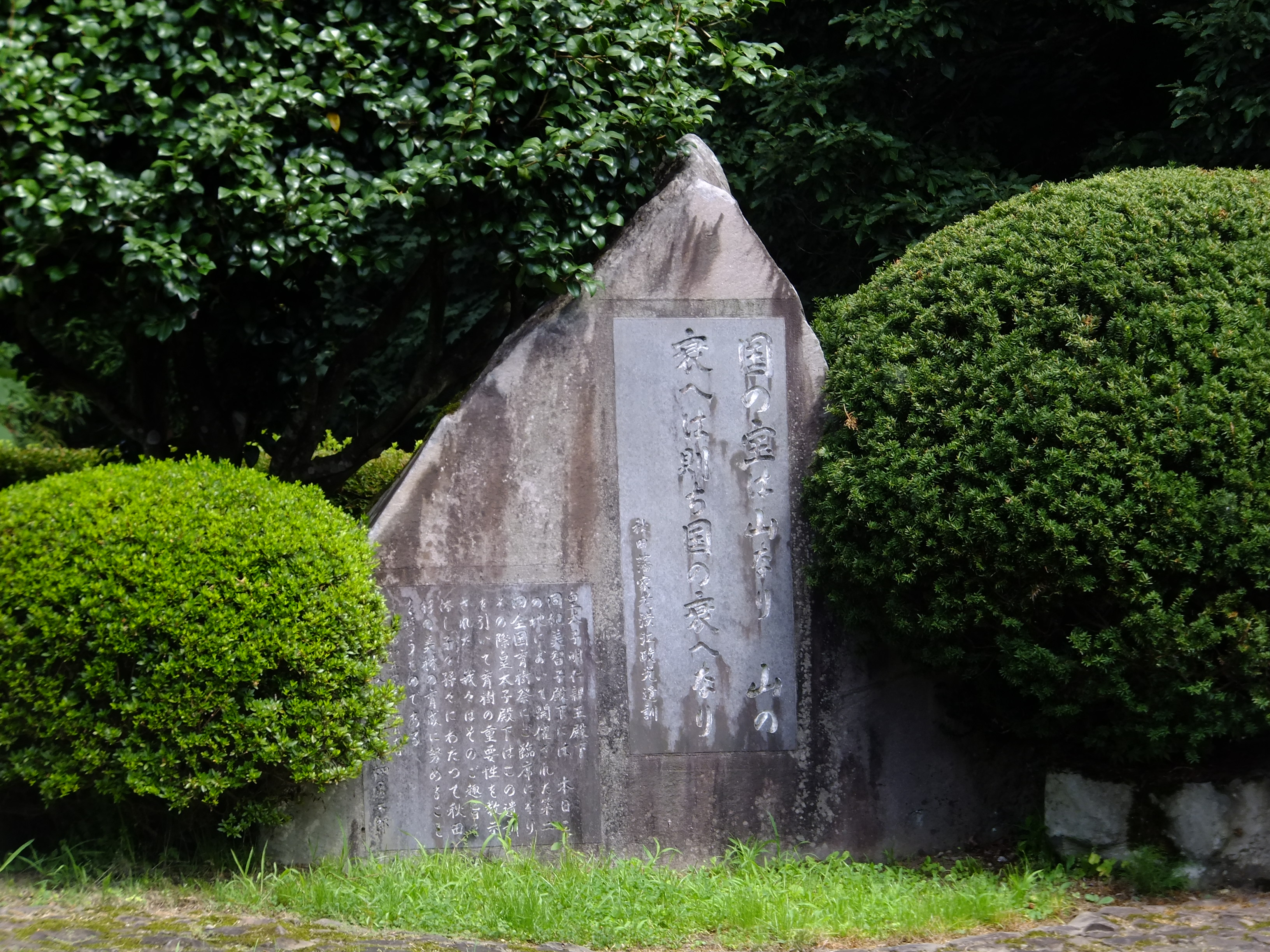 田沢湖湖畔にある秋田県県民の森にて。秋田藩初期の家老渋江政光の言「国の宝は山なり 山の衰へは国の衰へなり」が刻まれた石碑。